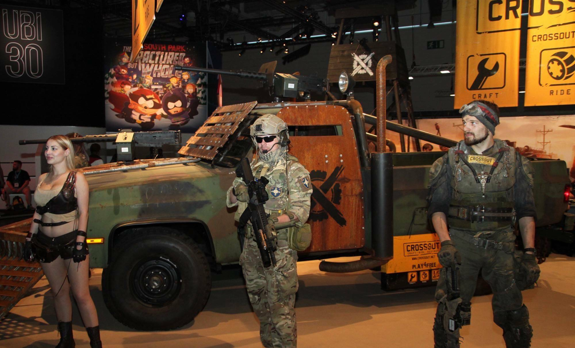 Gamescom 2016 impressions